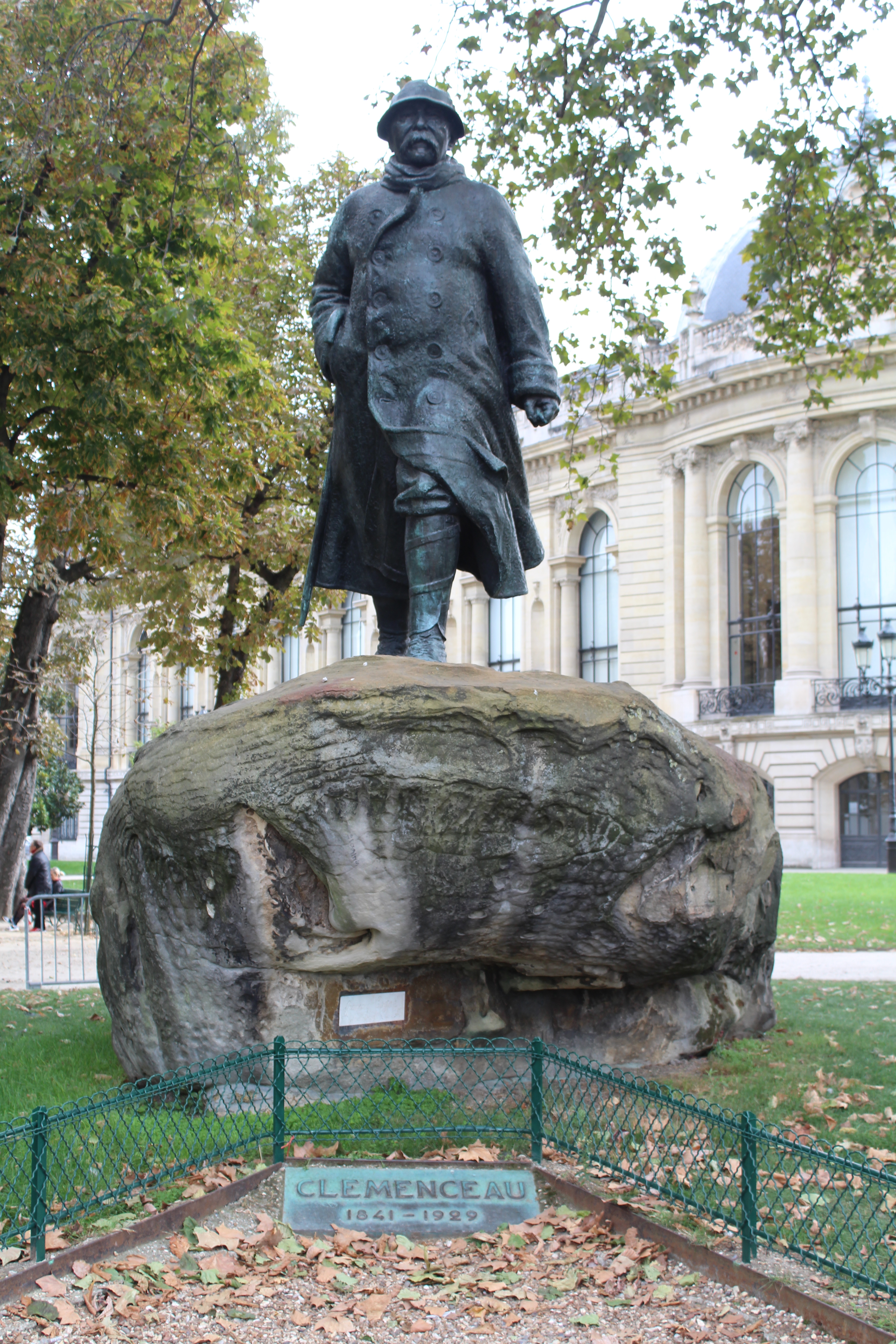 Statue Georges Clemenceau vers le Petit Palais à Paris.